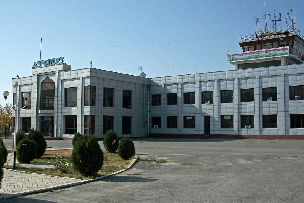 Kulyab Airport